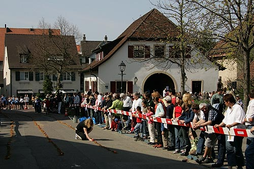 Eierleset in Arlesheim: Eier setzen auf der Rennstrecke